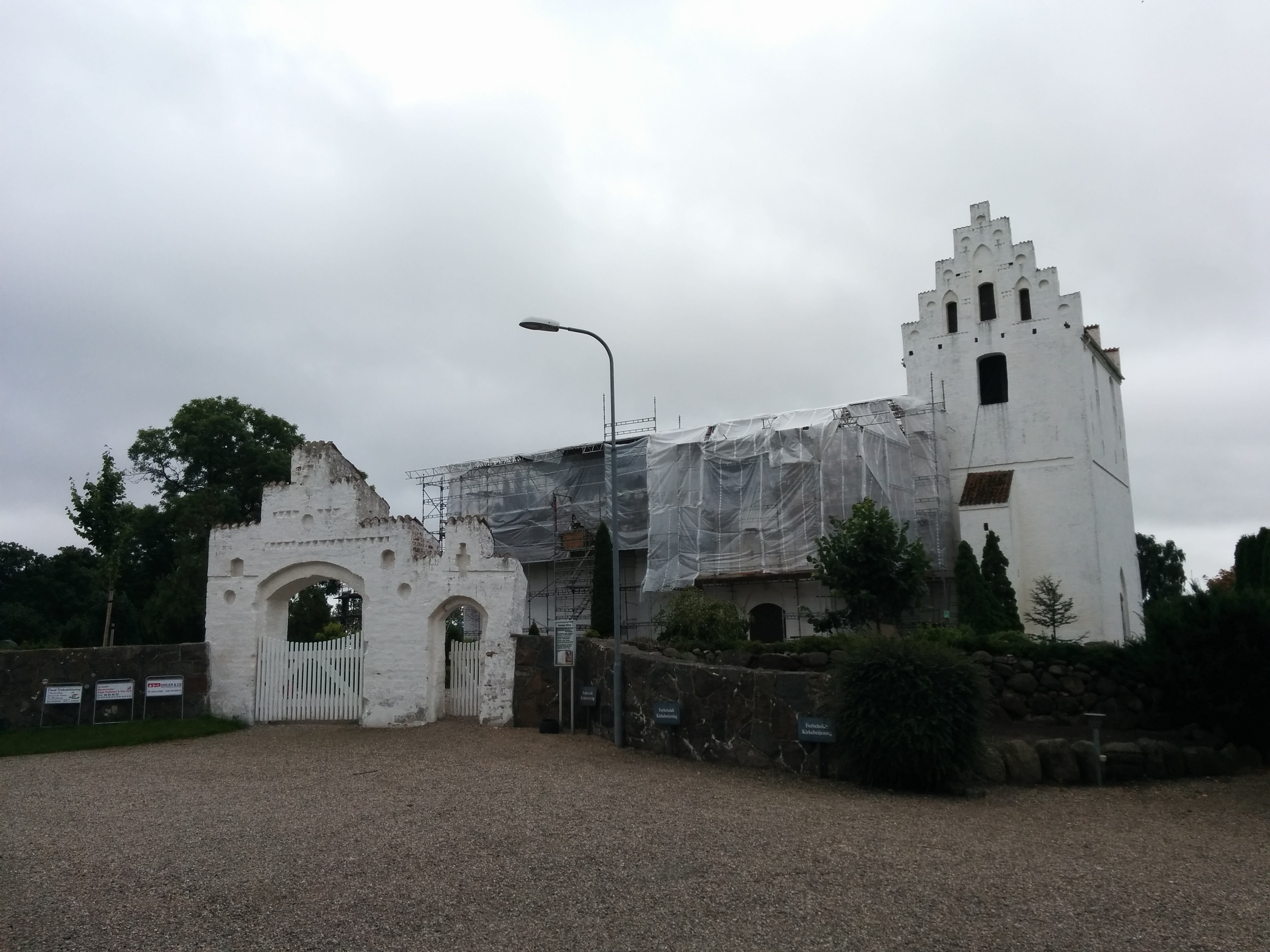 Avnslev Kirke fra nordvest